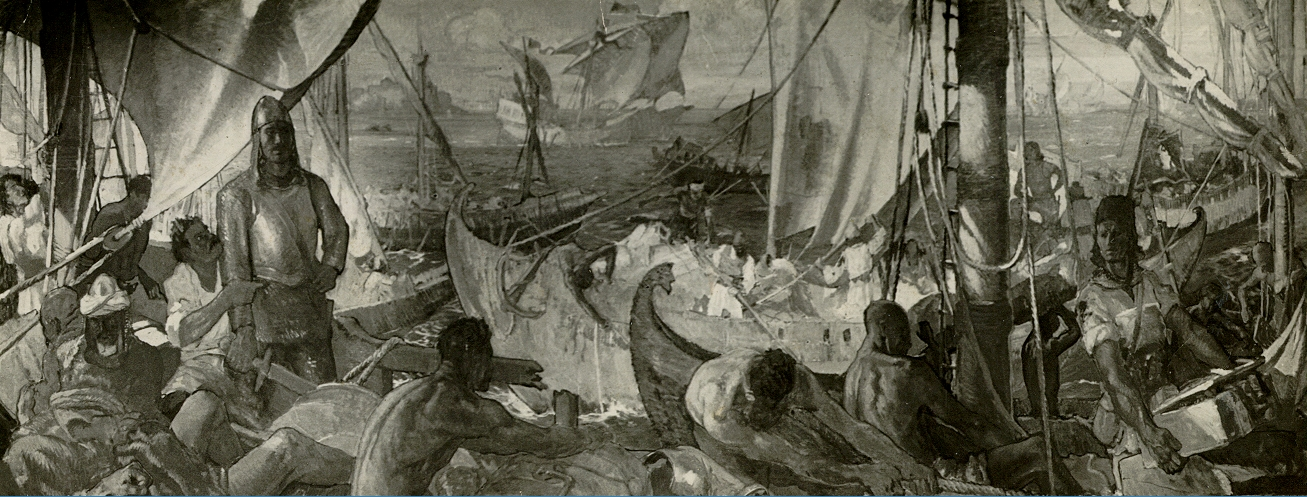 Marina moldovenească în timpul lui Ștefan cel Mare - Palatul Regal din Bucuresti